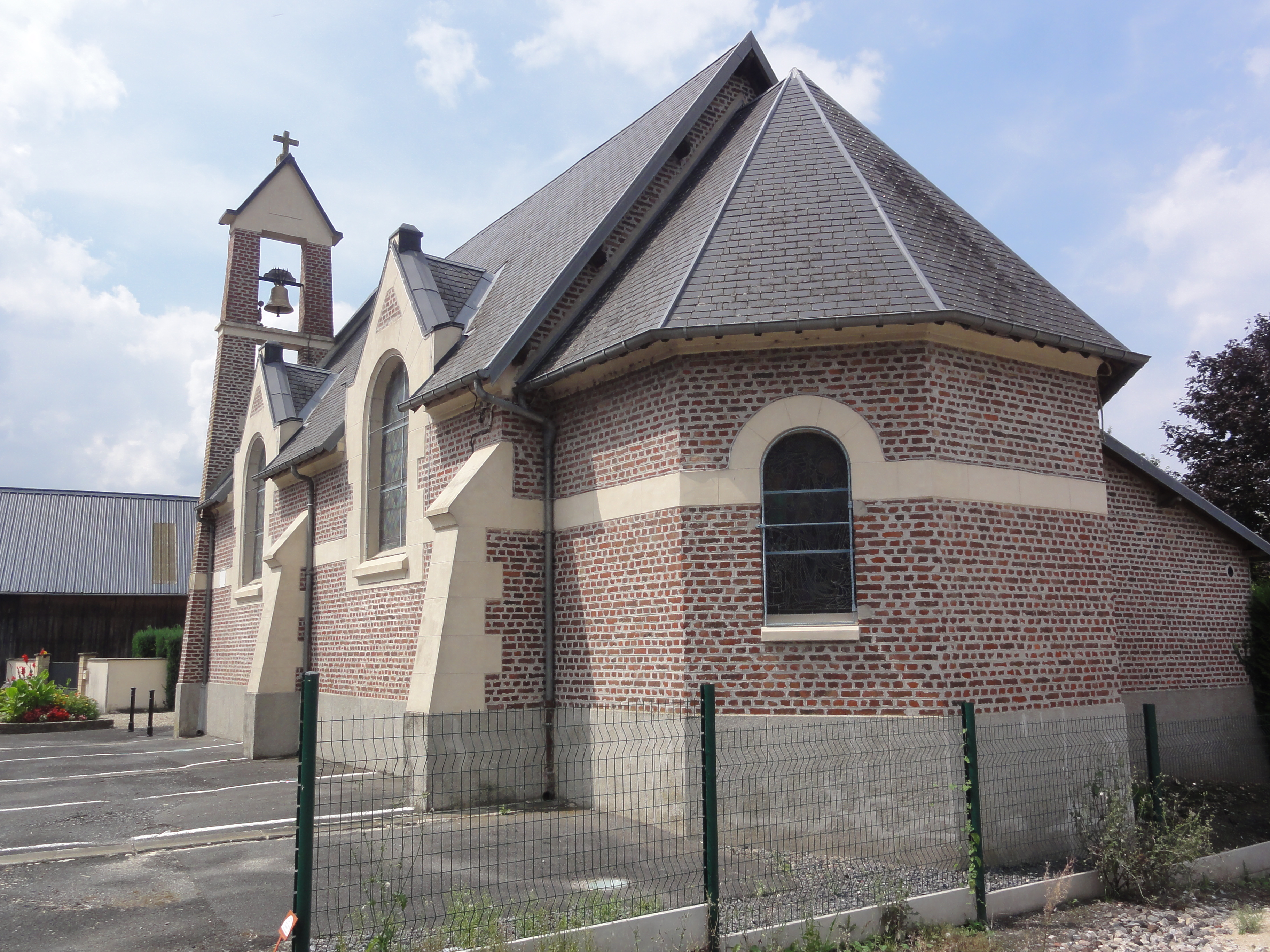 Essigny-le-Petit (Aisne) église